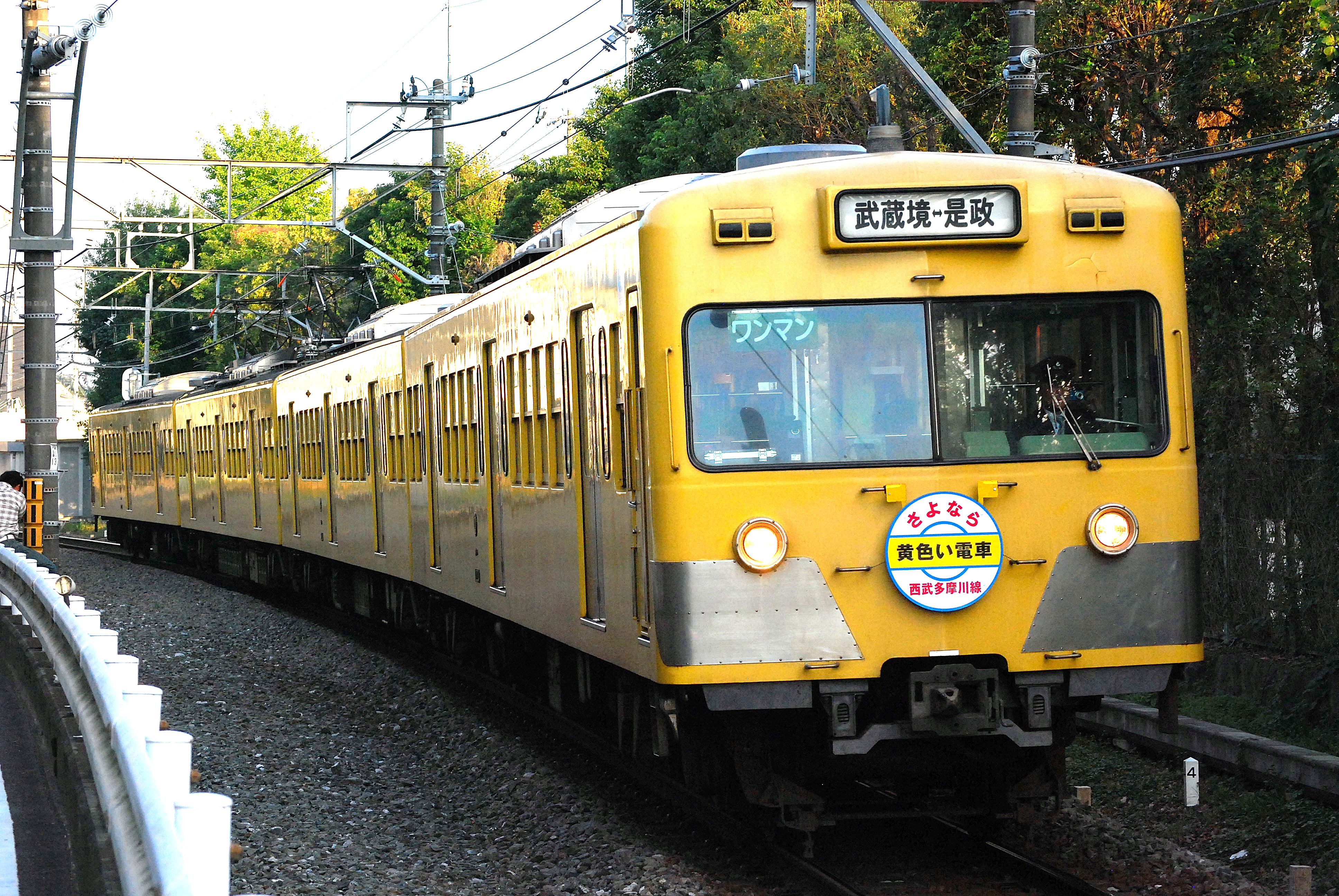 多摩川線を走行する最後の旧101系（223F編成）